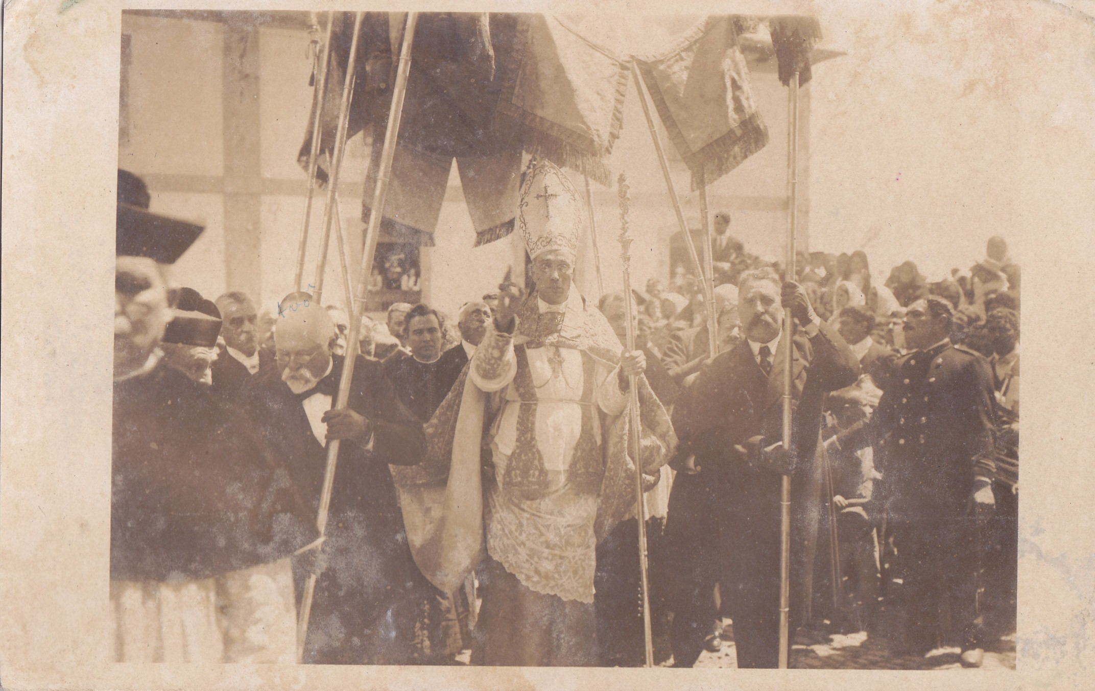 D. Manuel Damasceno da Costa, Bispo de Angra, foto tirada em 1 3 1918